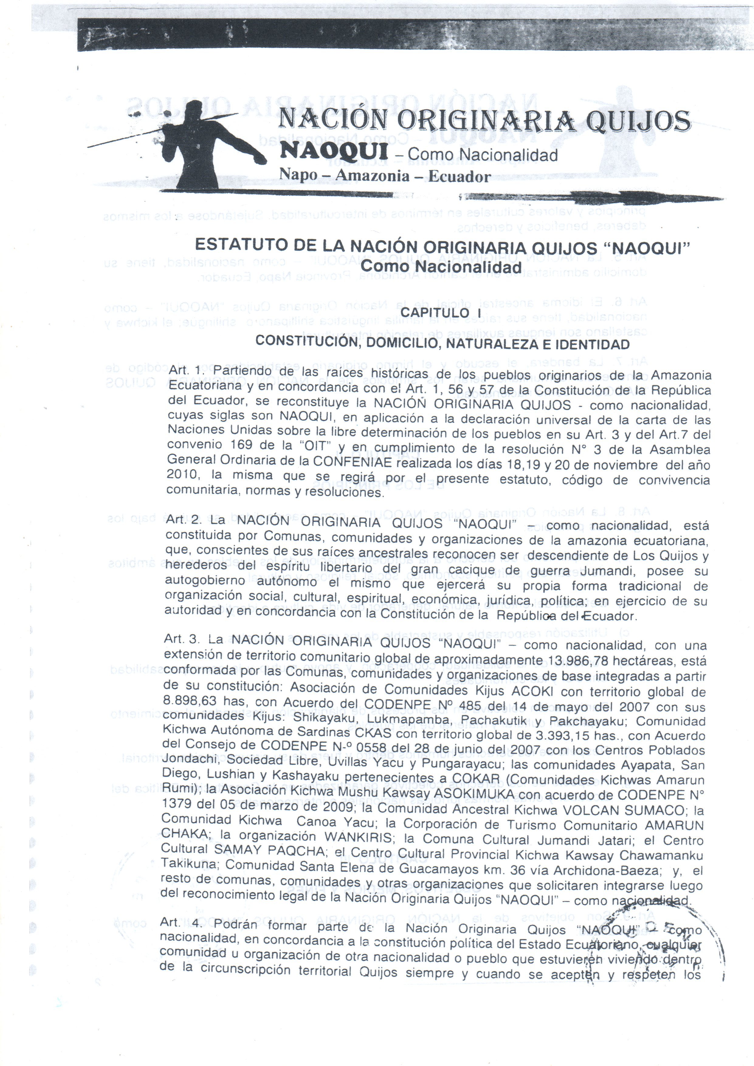 Estatuto de la Nación Originaria Quijos